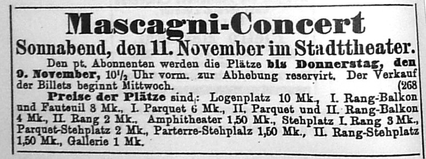 Anons koncertu Pietro Mascagniego w 1899 - Bromberger Zeitung 5-11-1899